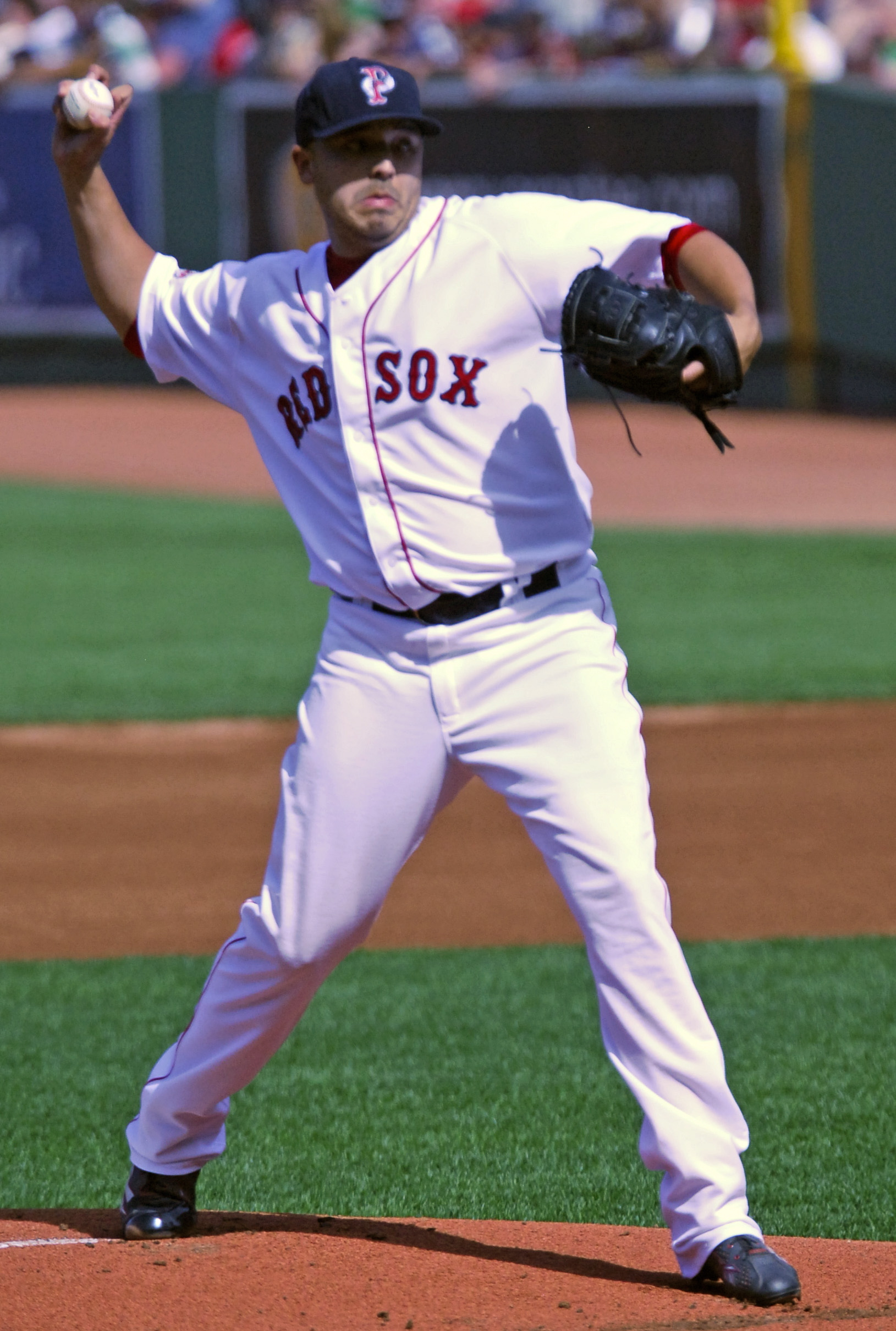 Charlie Zink